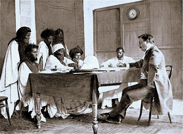 Xavier Coppolani in Mauretanien im Gespräch mit Scheichs